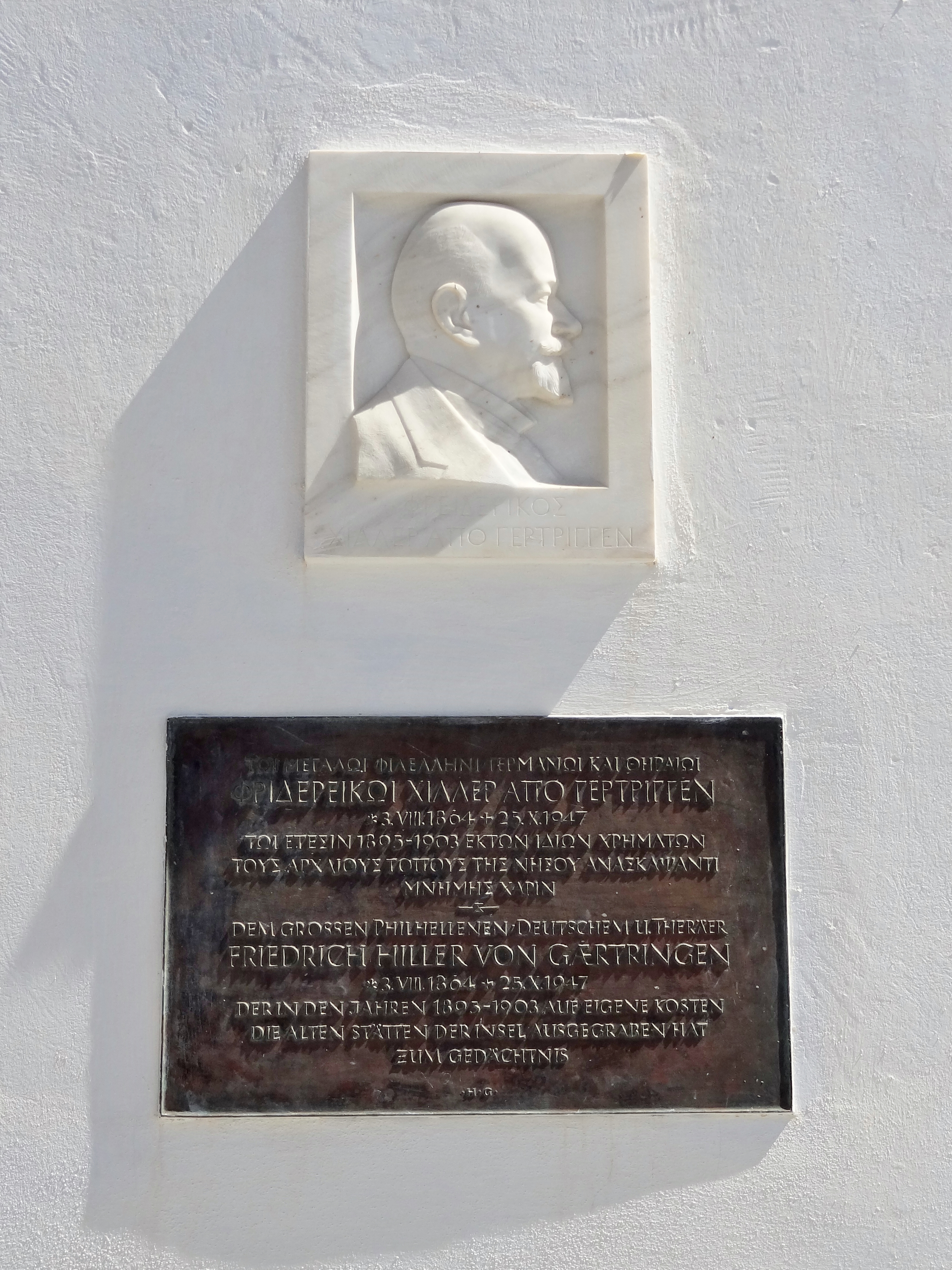 Gedenktafel für Friedrich Hiller von Gaertringen in Fira, Santorin, Kykladen, Griechenland